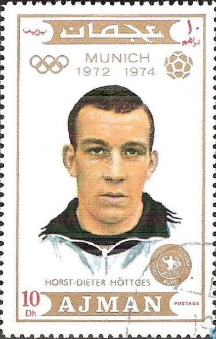 Horst-Dieter Höttges